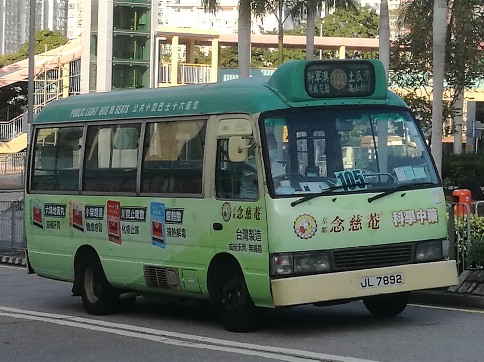 中文（中国大陆）: 小巴JL7892的照片